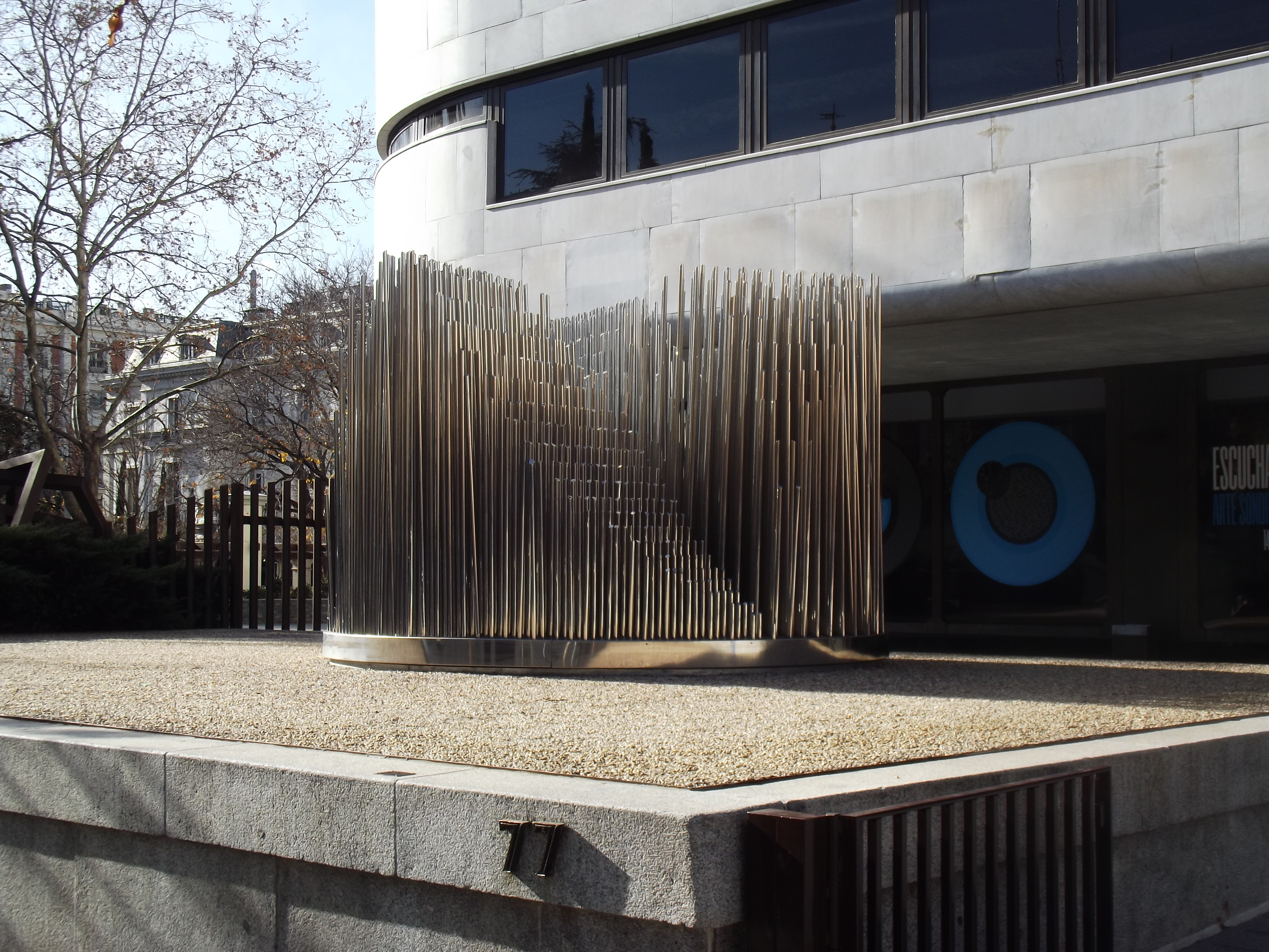 Órgano, de Eusebio Sempere Juan, Madrid.